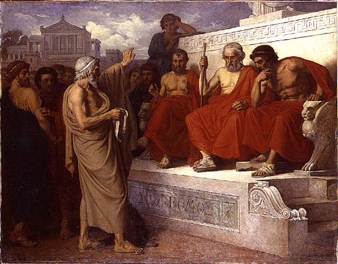 Sophocle accusé par ses fils